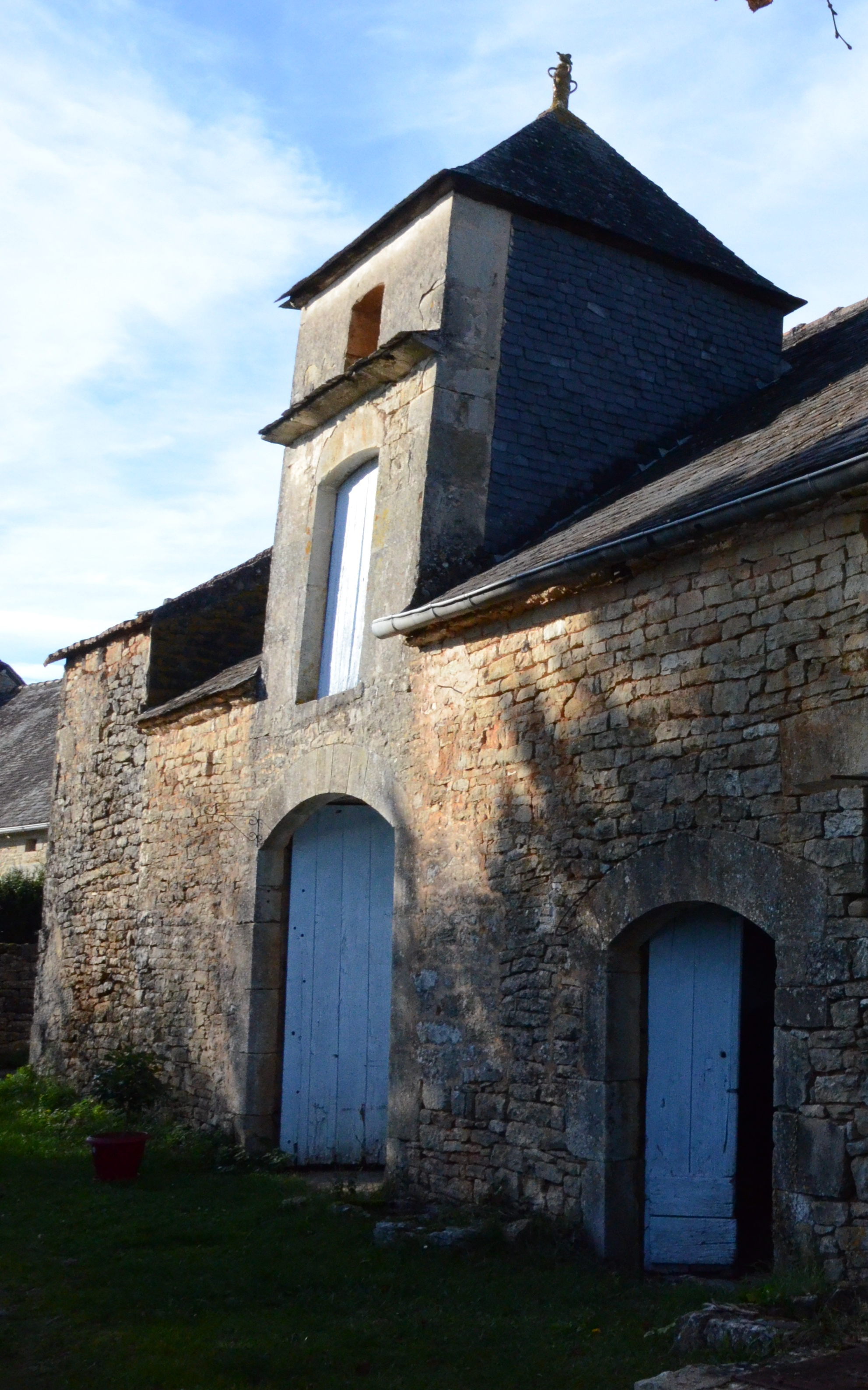 Maison du chevalier Pierre de Cérou, à Gignac Lot